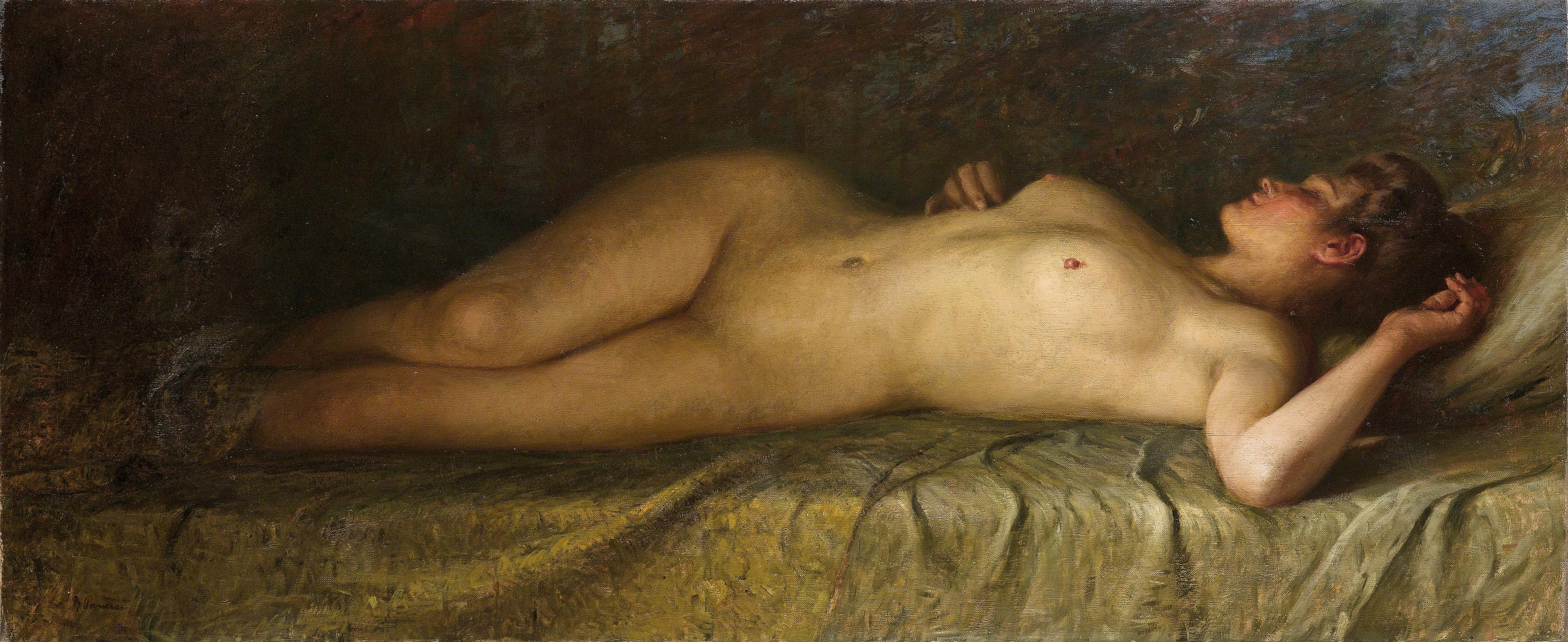 Liegender Frauenakt